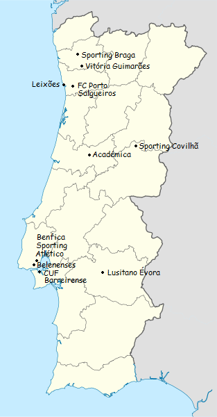 Carta dos clubes participantes do campeonato de portugal de futebol de primeira divisao 1960-1961